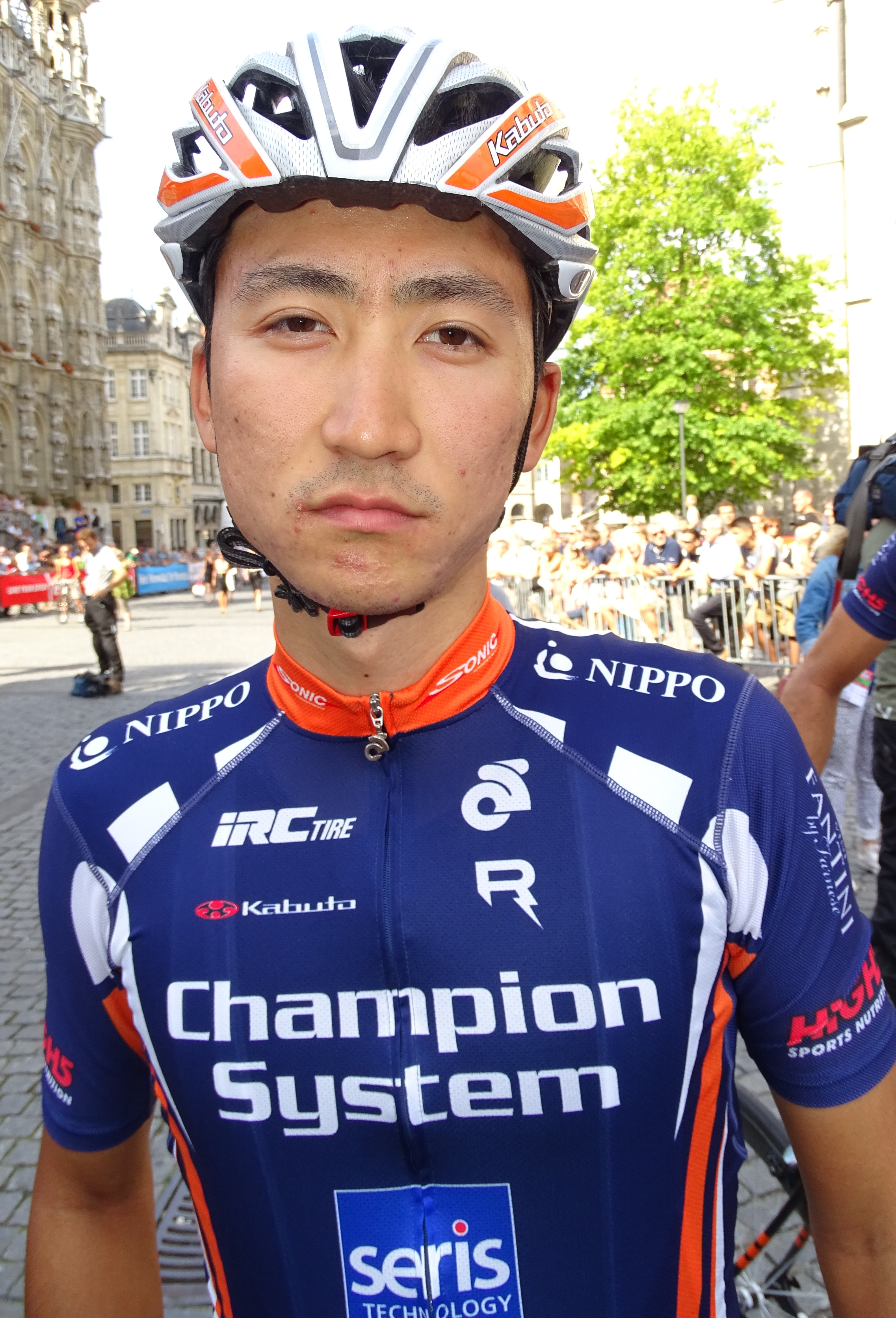 Reportage réalisé le dimanche 23 août à l'occasion du départ et de l'arrivée du Grand Prix Jef Scherens 2015 à Louvain, Belgique.